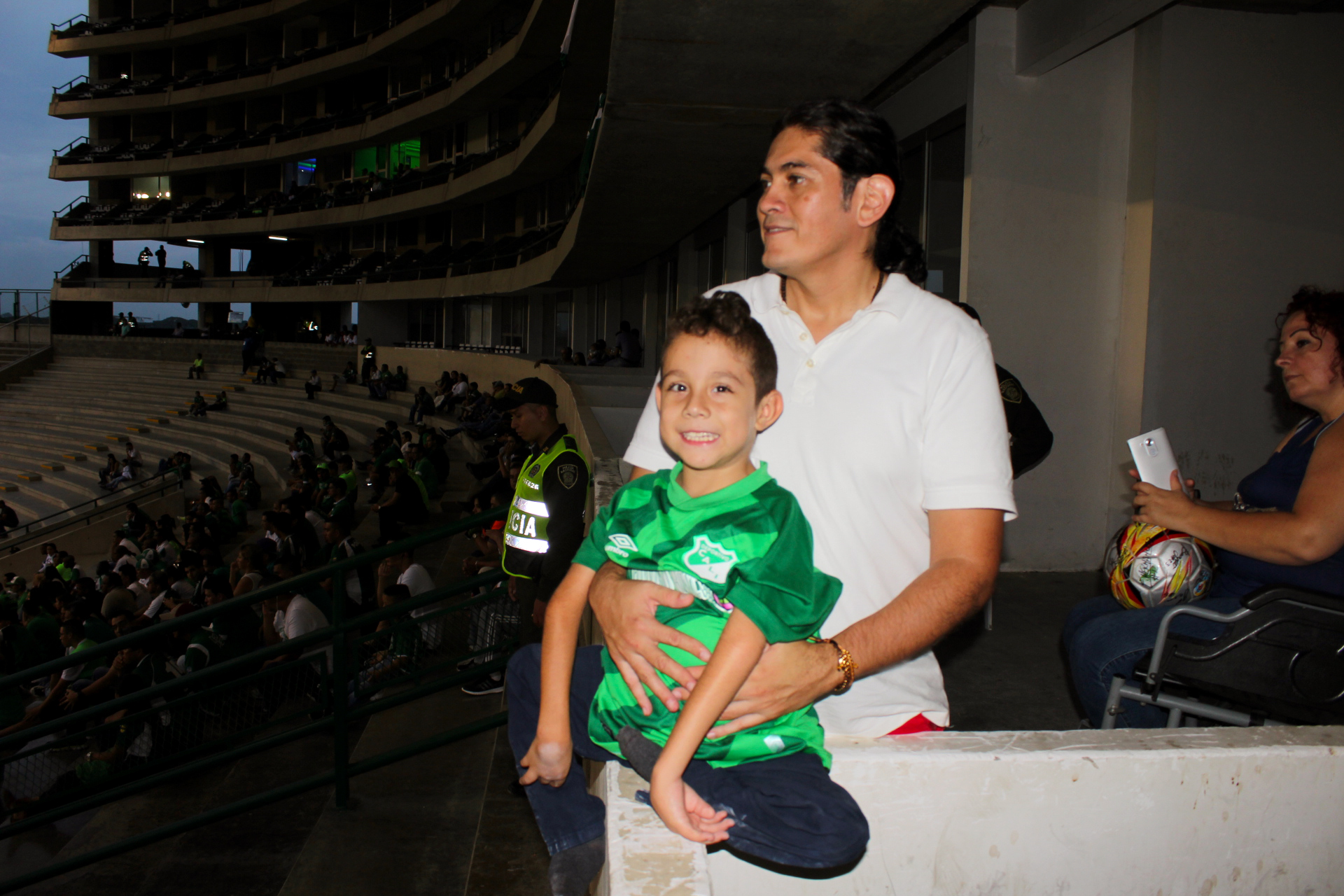 ‘Sebastián Cardona es un niño de 10 años con Artrogriposis múltiple congénita al que la Policía de Infancia y Adolescencia de Cali le cumplió un sueño. Todo inicia cuando en el evento de la celebración del día mundial de las enfermedades raras, Catalogada como una de las enfermedades huérfanas este grupo de la Policía conoció la historia del niño y decidió cumplirle su sueño de conocer a los jugadores del Deportivo Cali y poder entrar a los camerinos del equipo de futbol, además de recibir por parte de todos un balo firmado por cada uno de los jugadores y la camiseta original del equipo del cual es hincha. Sebastián quien quiere ser arquero de futbol cumplió su sueño y agradeció a los uniformados por esta labor.’